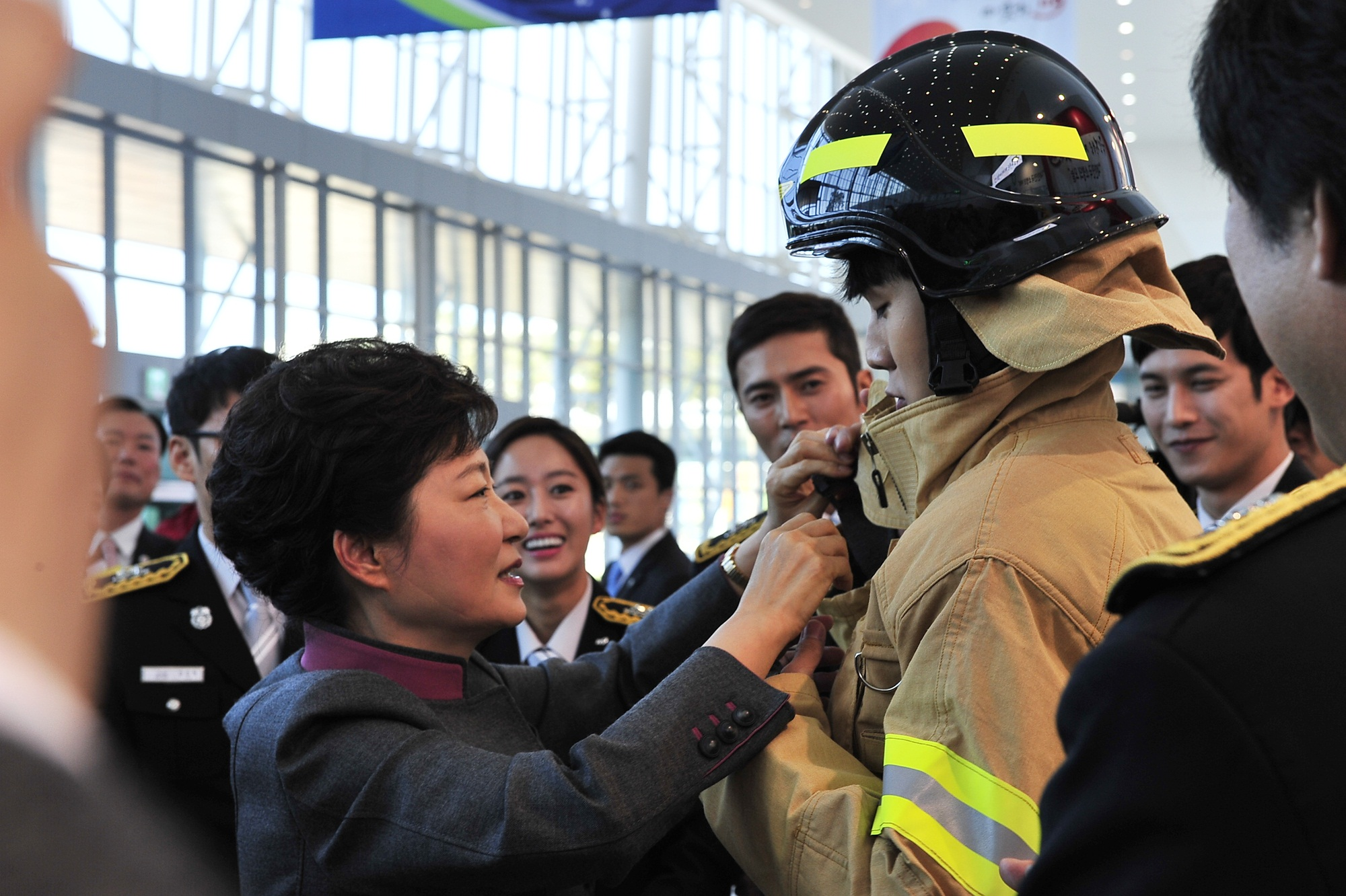 2013년 제51회 소방의날